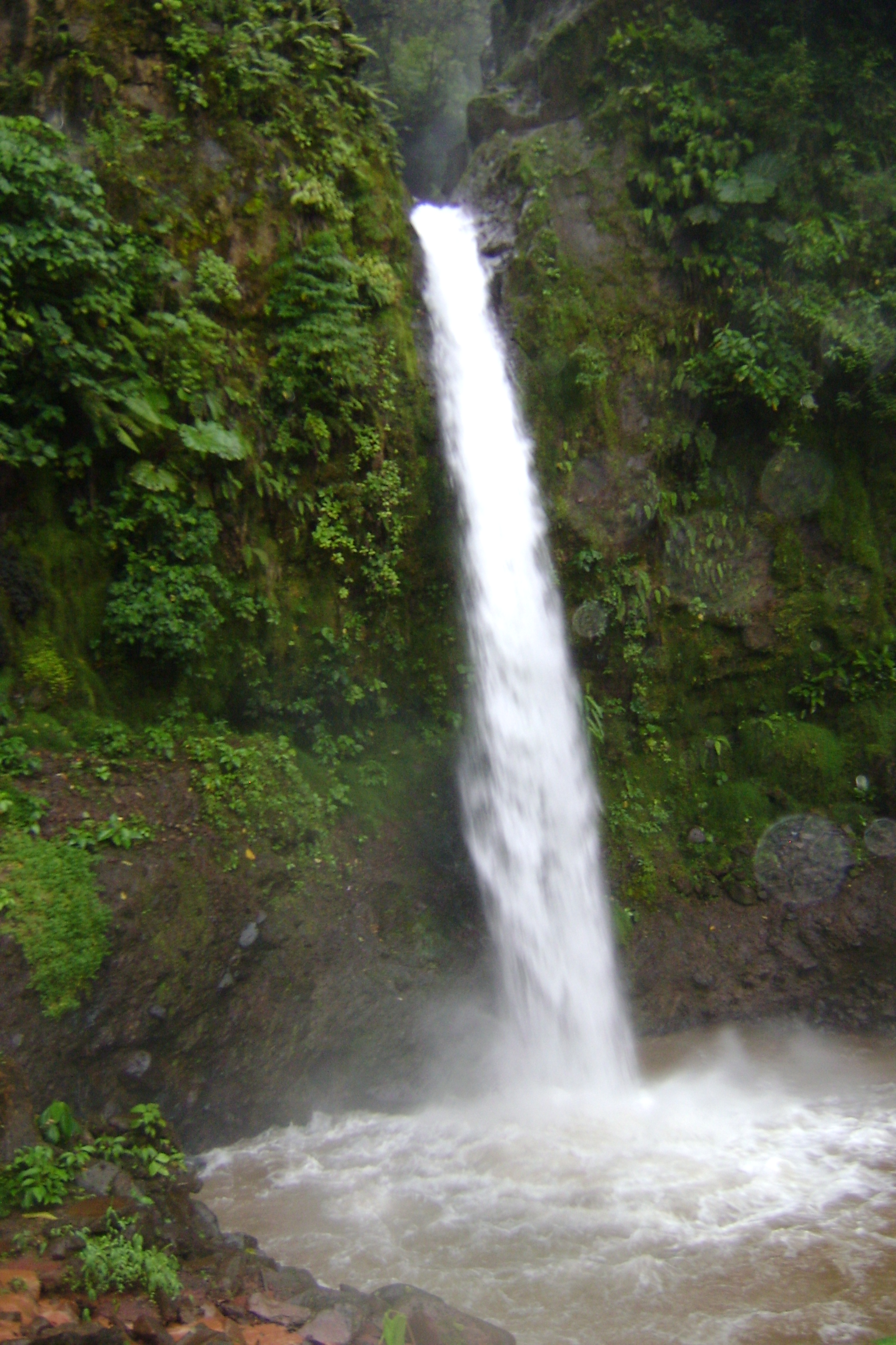 Catarata de la paz, Vara Blanca, CR